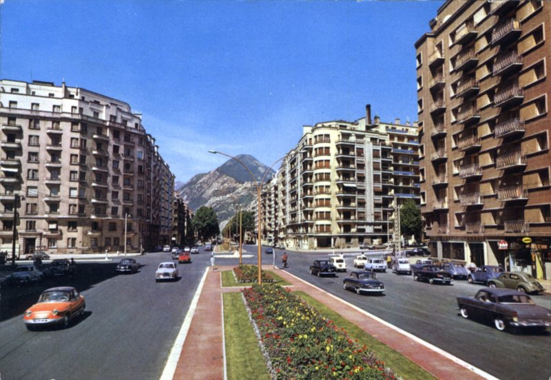 Cours de la Libération en 1964 avant la construction de l'autopont - Grenoble (France).